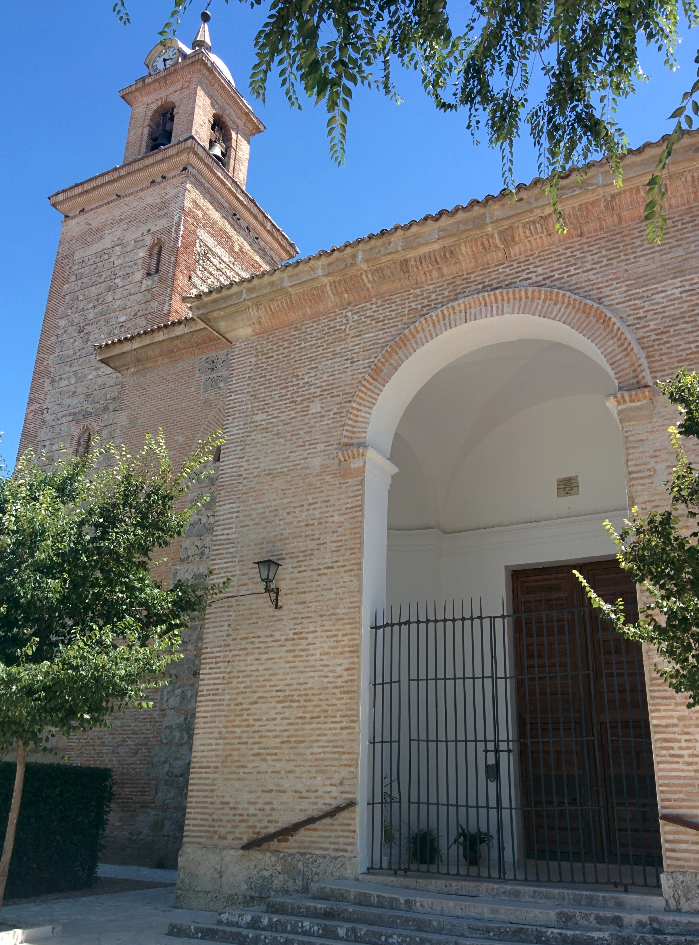 Iglesia de Nuestra Señora de la Asunción, en Esquivias (Toledo, España).